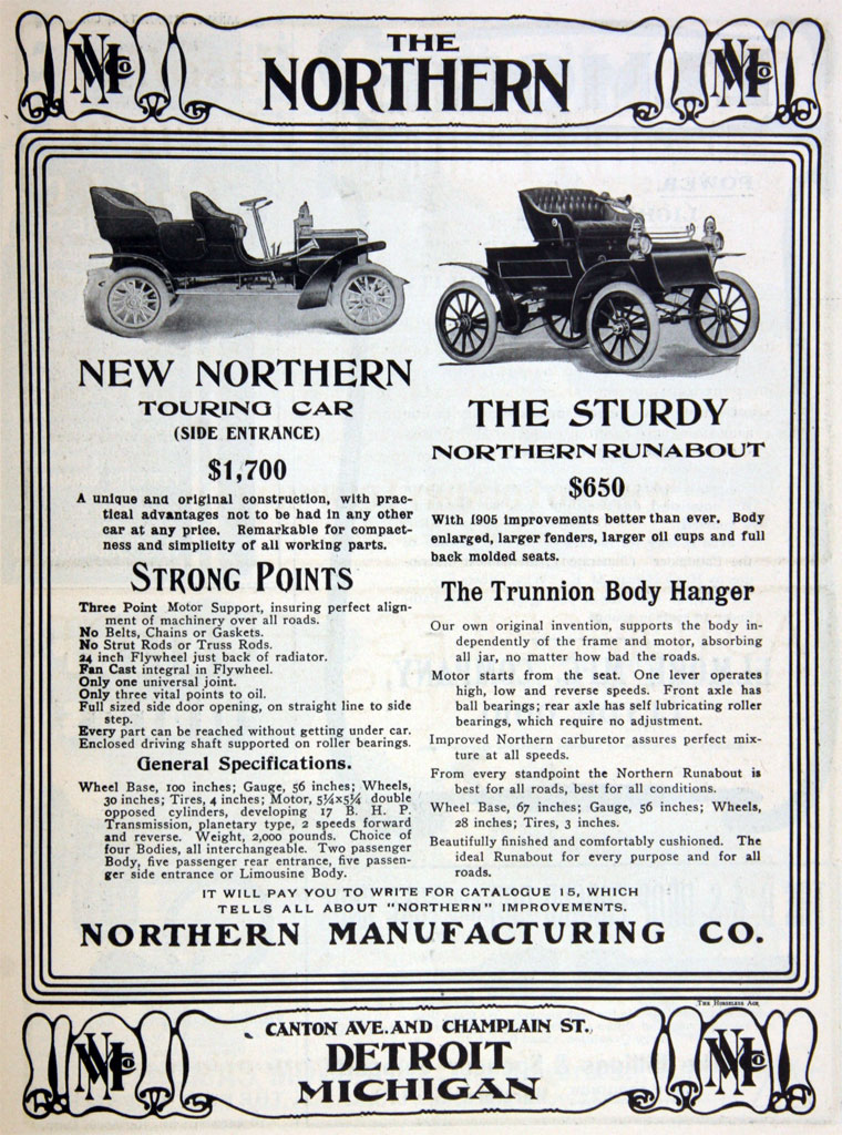 Northern Runabout and Touring car advertisement by the Northern Mfg. Co. of Detroit. The runabout was designed by Jonathan D. Maxwell, the Touring car by Charles Brady King.